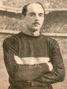 Dino Sani, jugando para Boca Juniors en 1961.